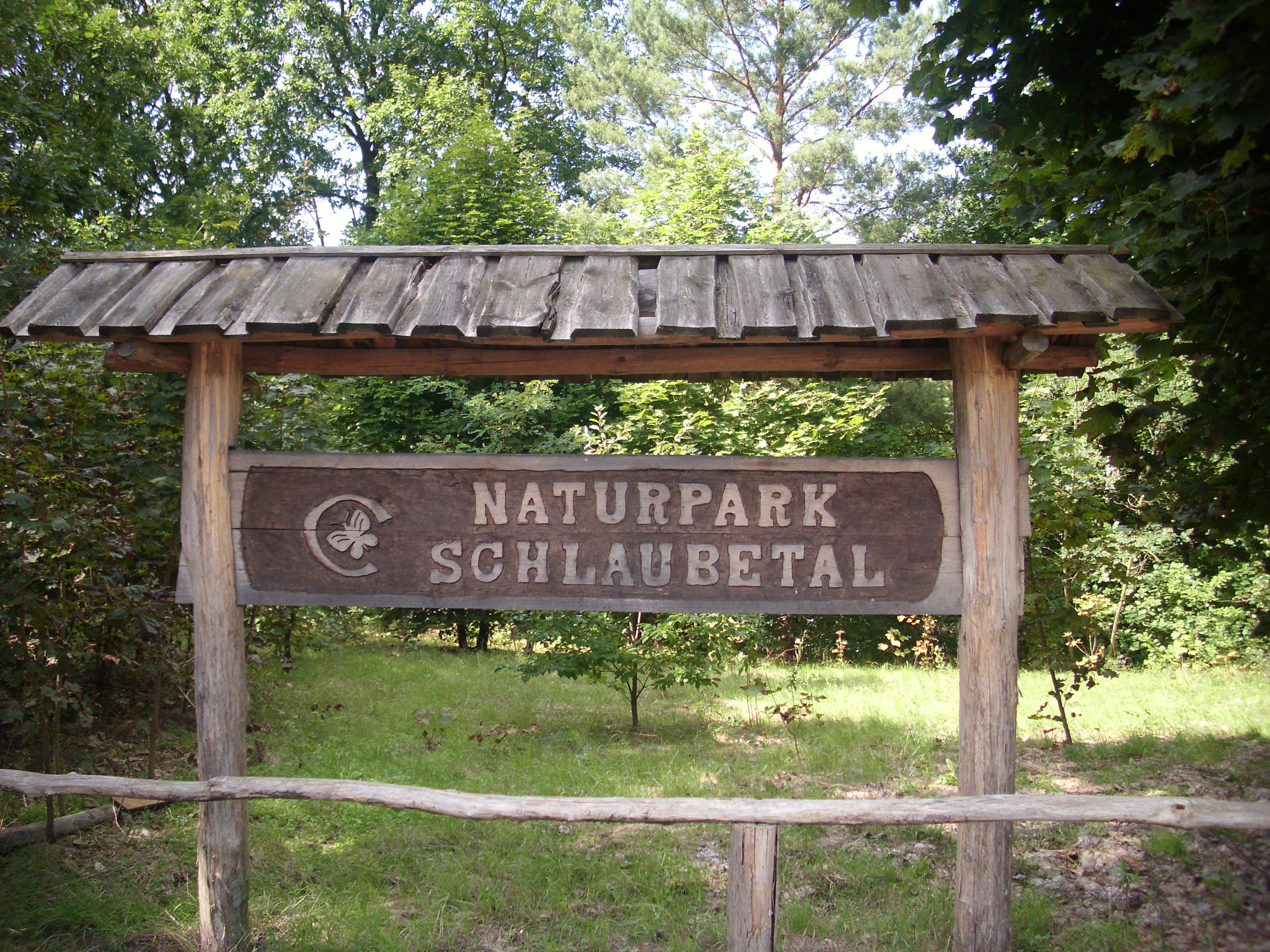 Schild Naturpark Schlaubetal, Brandenburg